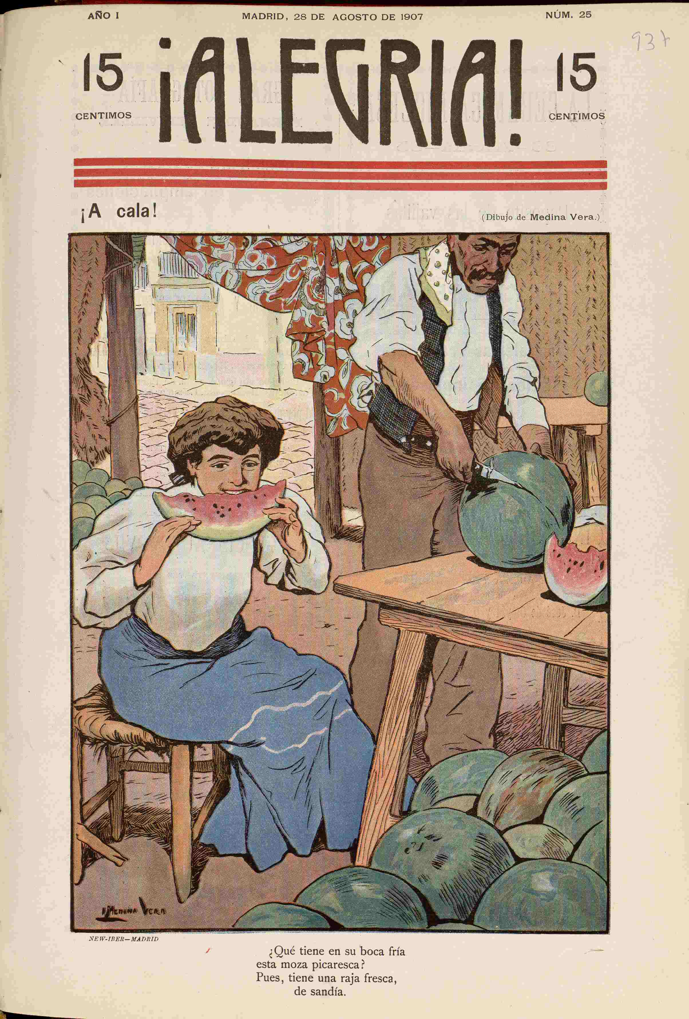 ¡A cala!.